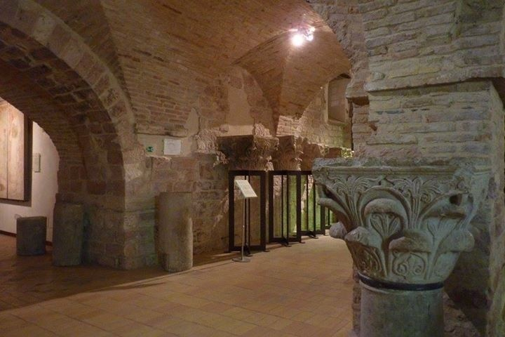 Corridoio